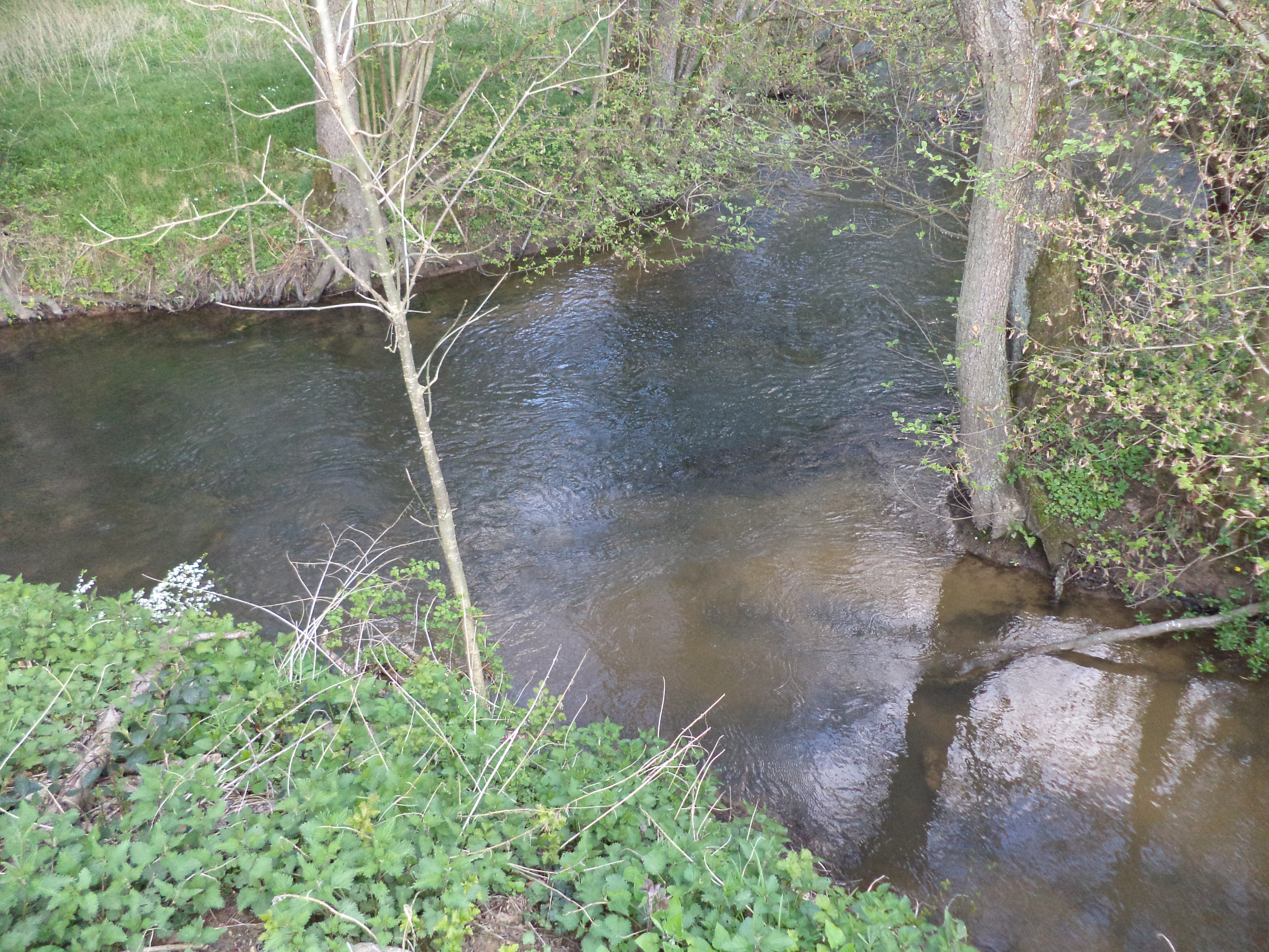 Der Aubach (vorne rechts) mündet in die Elsava (von hinten nach links)